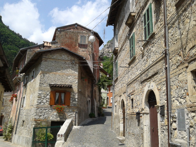 Borgo antico di Tagliacozzo